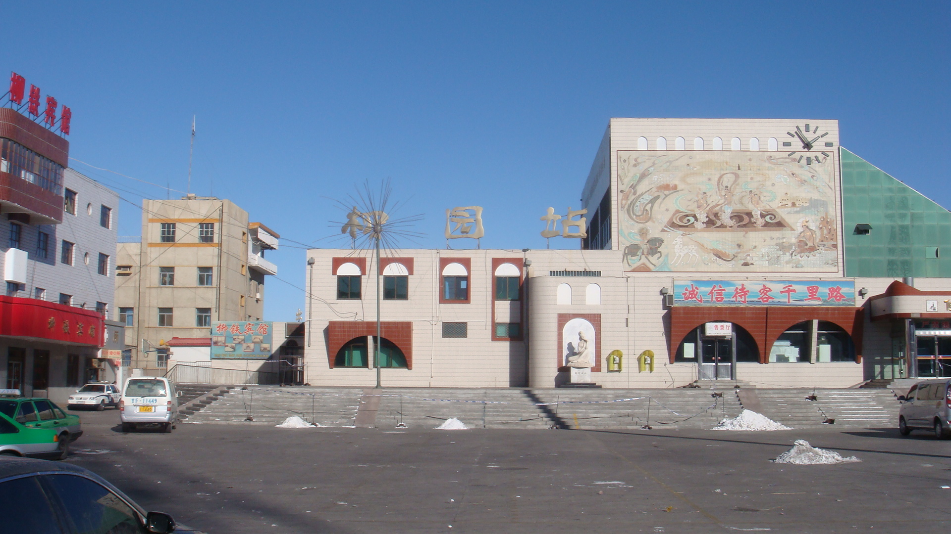 柳园火车站 Liuyuan Railway Station China Xinjiang Urumqi Welcome you to tour the, Китай Синьцзяна Урумчи приветствовать Вас на экскурсию, الصين ترحب زيارتك لاورومتشى فى شينجيانغ, 中国新疆のウルムチへの訪問を歓迎する, 中国新疆乌鲁木齐欢迎您来观光旅游